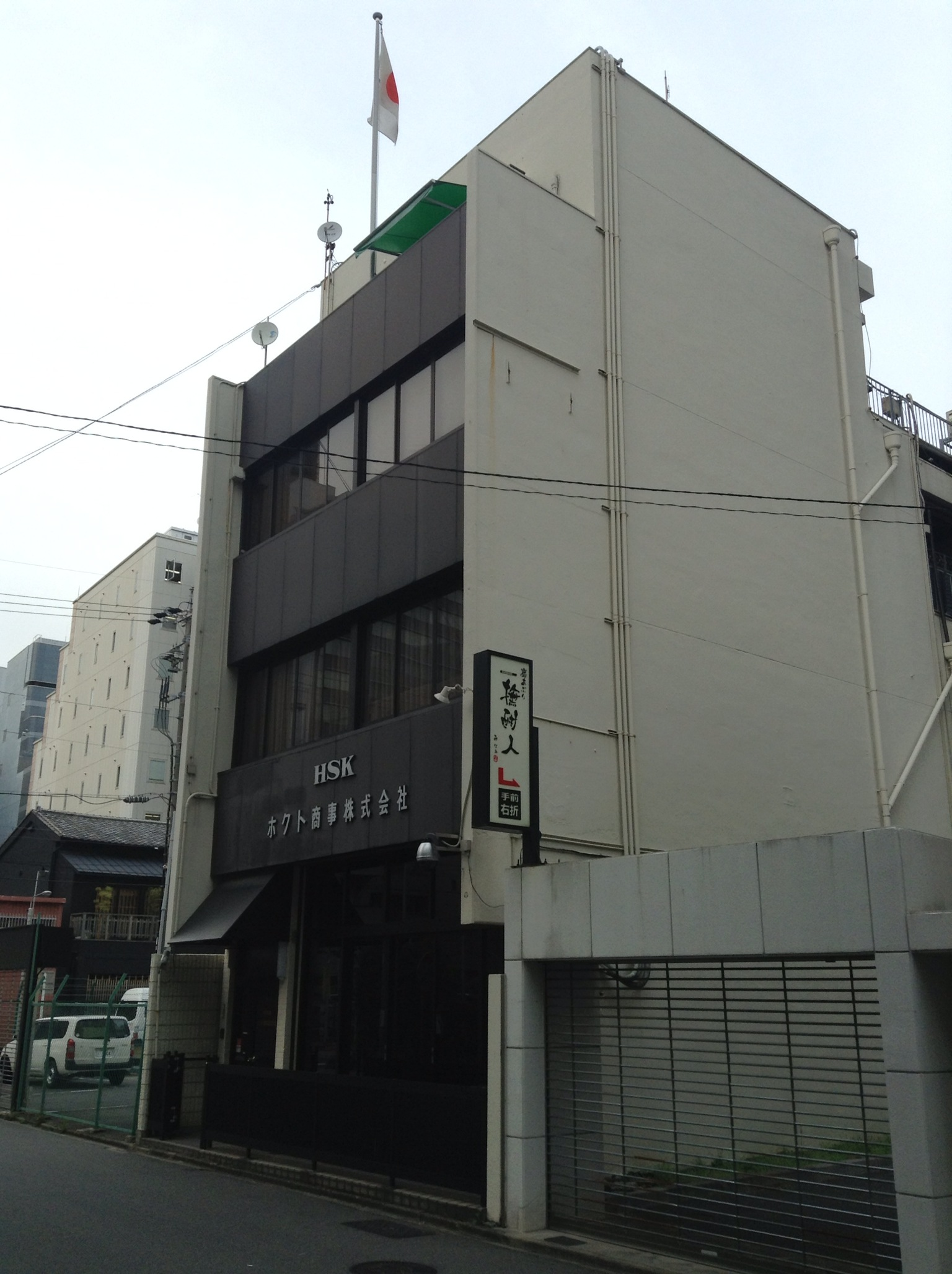 名古屋市中村区名駅南一丁目のホクト商事本社を西側公道南側より撮影